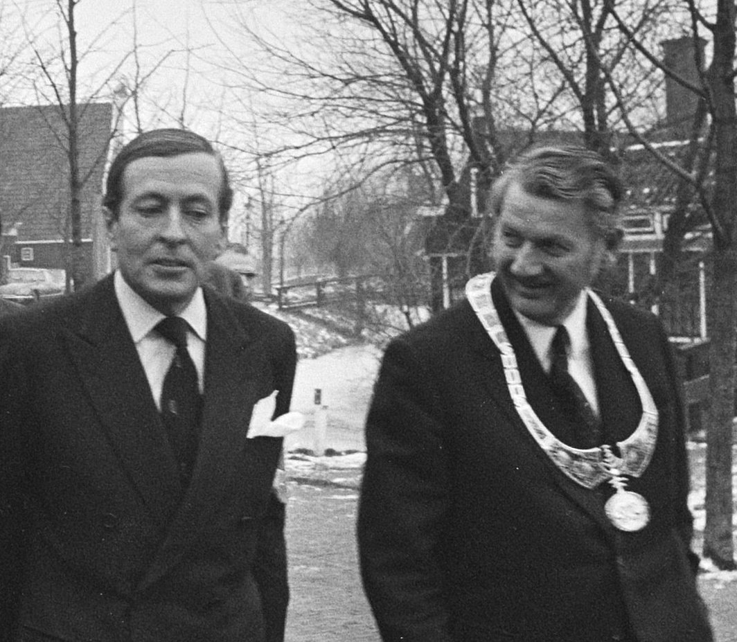 Prins Claus opent Zaans Uurwerkmuseum in Zaanstad; Prins Claus op Zaanse Schans met Van der Molen (voorz. Sticht. Uurwerken ) en burgemeester Laan /